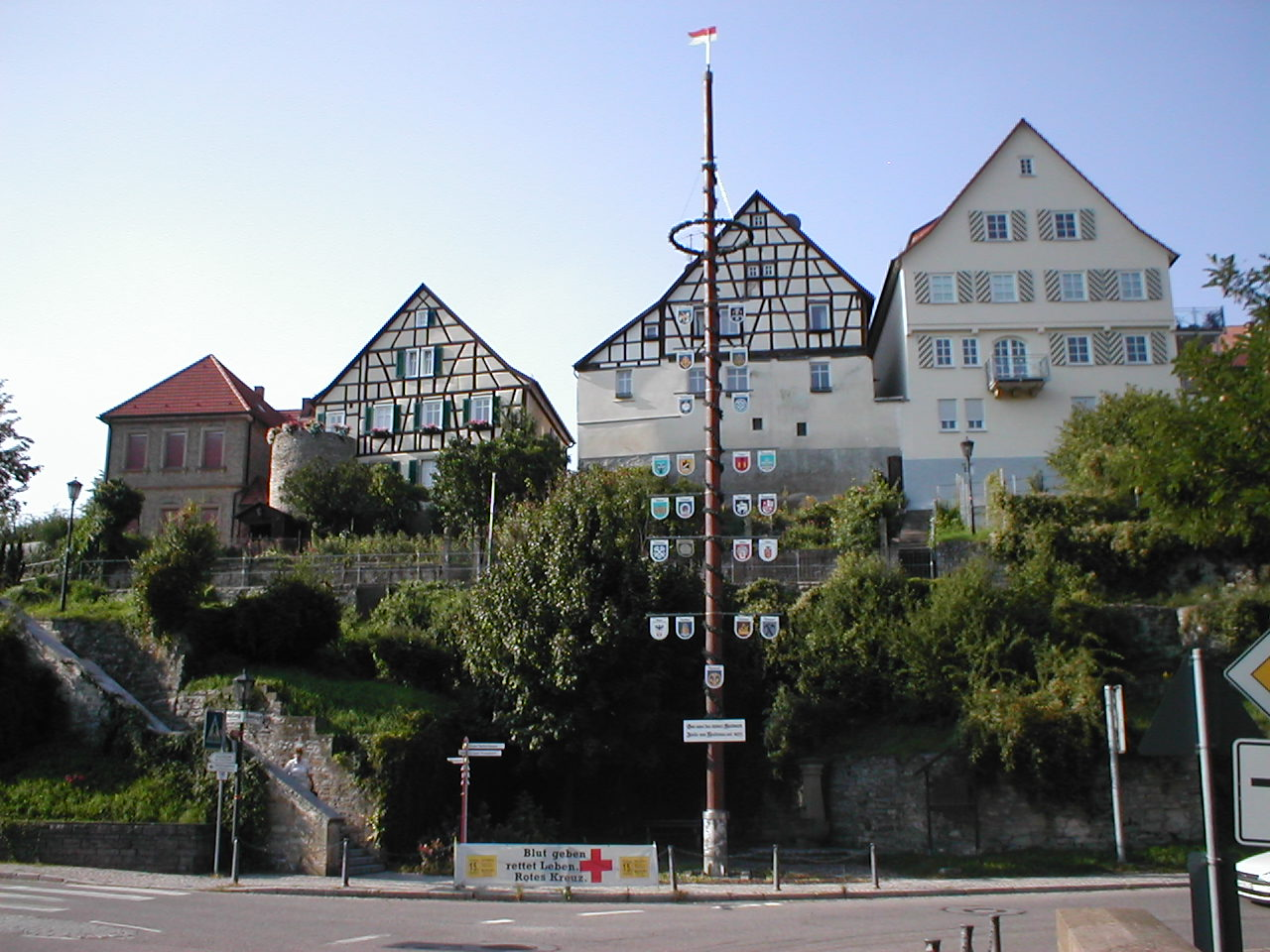 Neudenau an der Jagst, Ansicht der Altstadt zum Jagsttal hin mit Resten der Stadtmauer und eines Wehrturms.